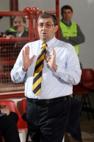 Immagine rilasciata dal proprietario della stessa, pallacanestro Varese